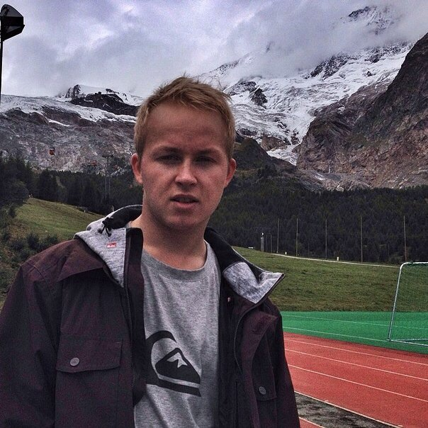 Даниил Калачев- действующий чемпион России по фристайлу в дисциплине слоуп-стайл.